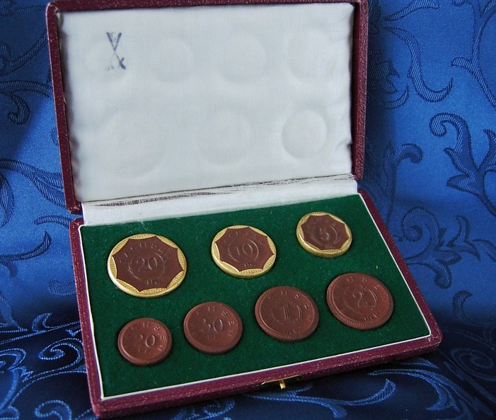 Münzsatz in einer privaten Schachtel